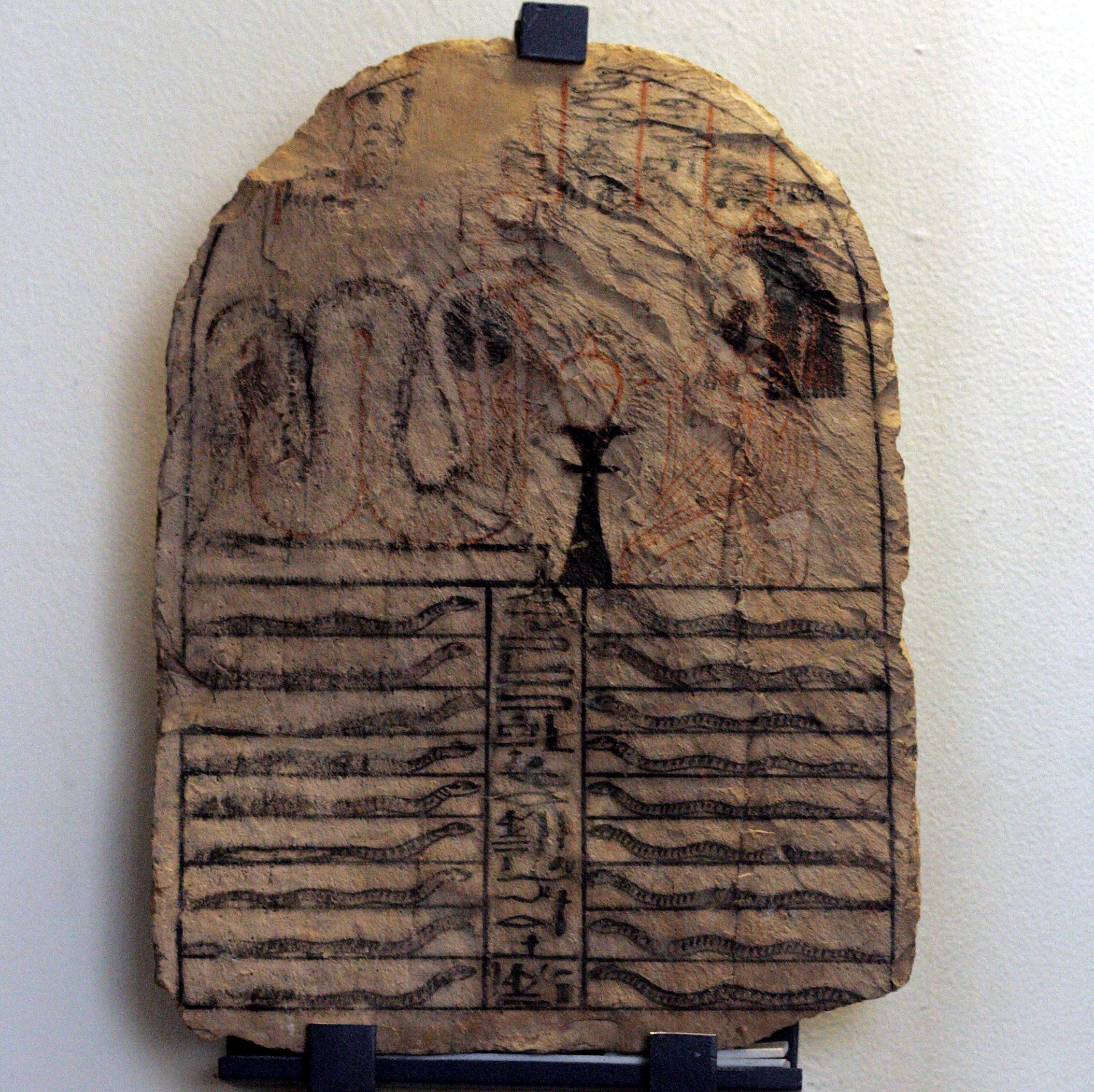 ArtistUnknownDescription Meretseger stele Current location (Inventory)Louvre Museum Native nameMusée du LouvreLocationParisCoordinates48° 51′ 37″ N, 2° 20′ 15″ E Established1793Website control : Q19675 VIAF: 257711507 ISNI: 0000 0001 2260 177X ULAN: 500125189 LCCN: n80020283 NLA: 35912436 WorldCat Sully Rez-de-chaussée Les animaux et les dieux Salle 19Accession numberE 13084ReferencesLouvre.frSource/PhotographerRama Meretseger stele